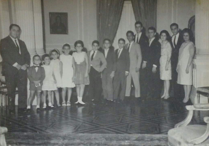 No Palácio das Princesas, Paulo e Virginia Guerra com os filhos (Foto: Face)